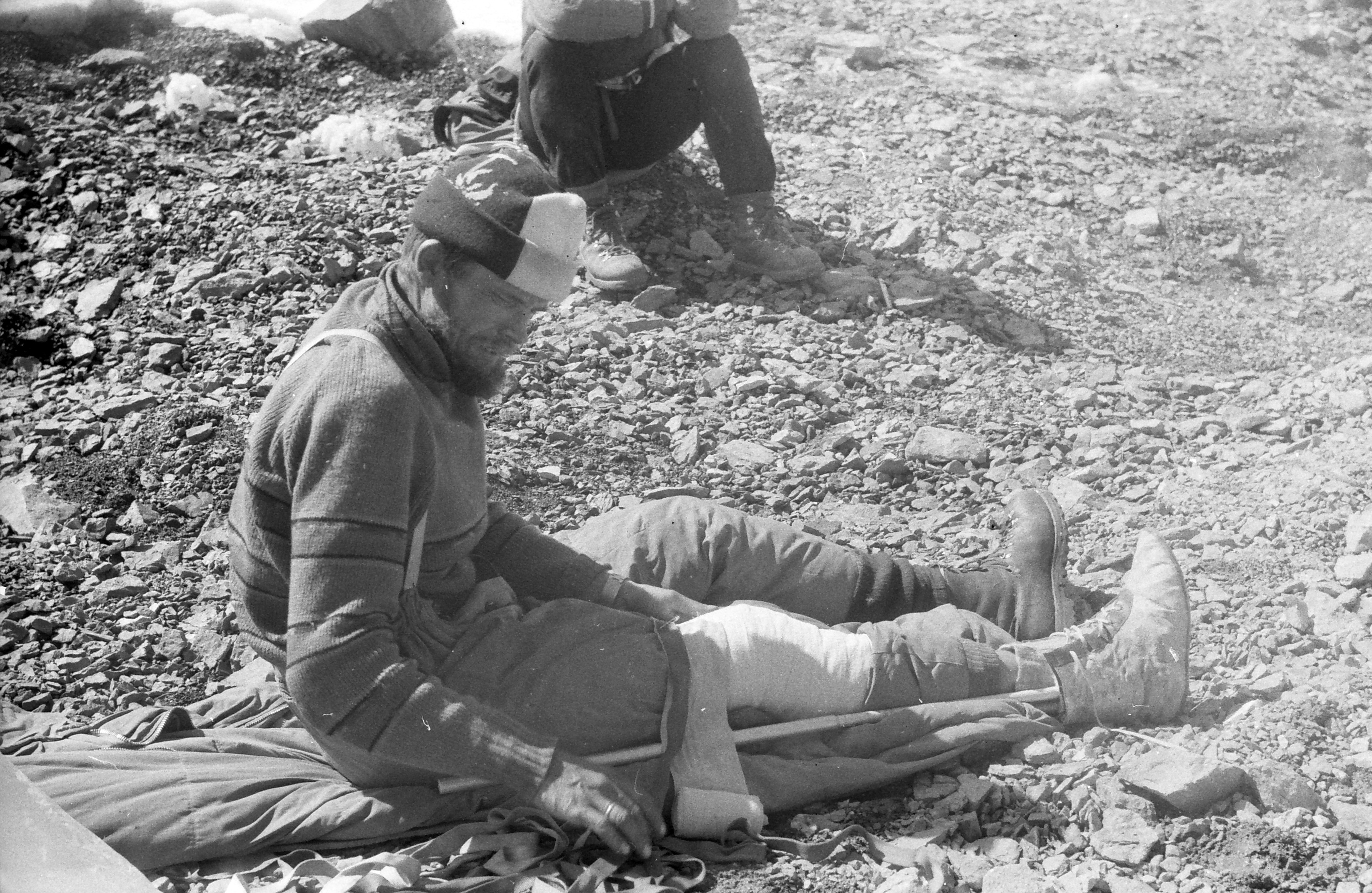 Ekspeditsioon mäetipule "Tartu Ülikool 350". Hindrek Kriis.